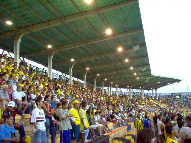 Voltaço x America(MG)